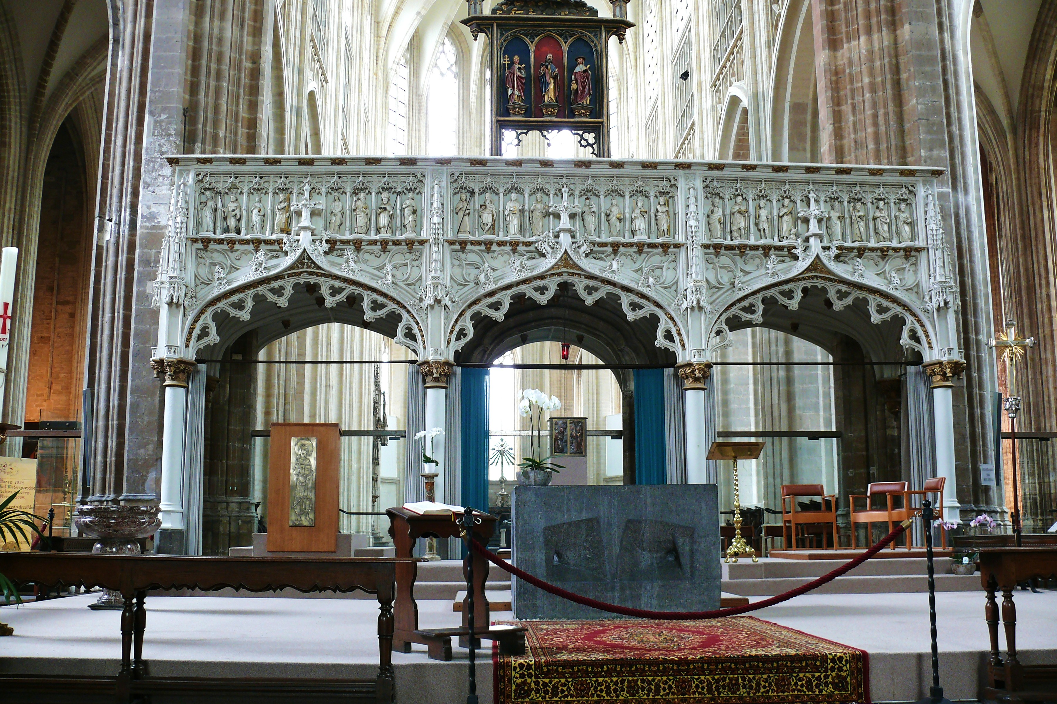 Lettner in der Sint Pieterskerk von Leuven (Belgien)